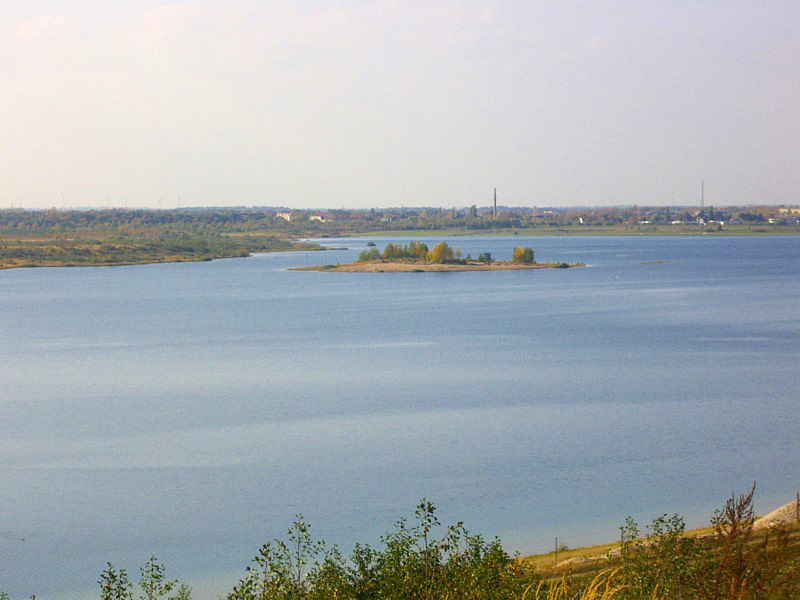 Blick auf die Getzelauer Insel im Naturschutzgebiet, Markkleeberger See